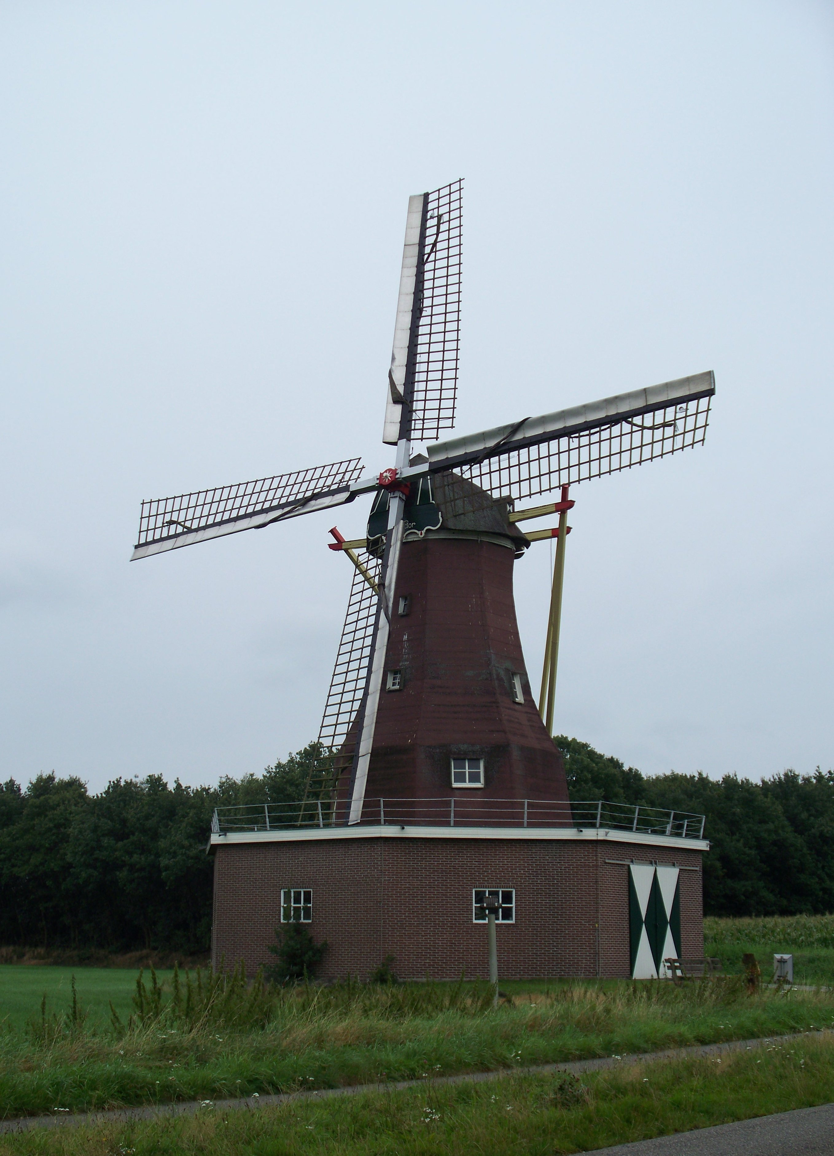 Windmolen Sint Victor te Zeeland, Verbindingsweg